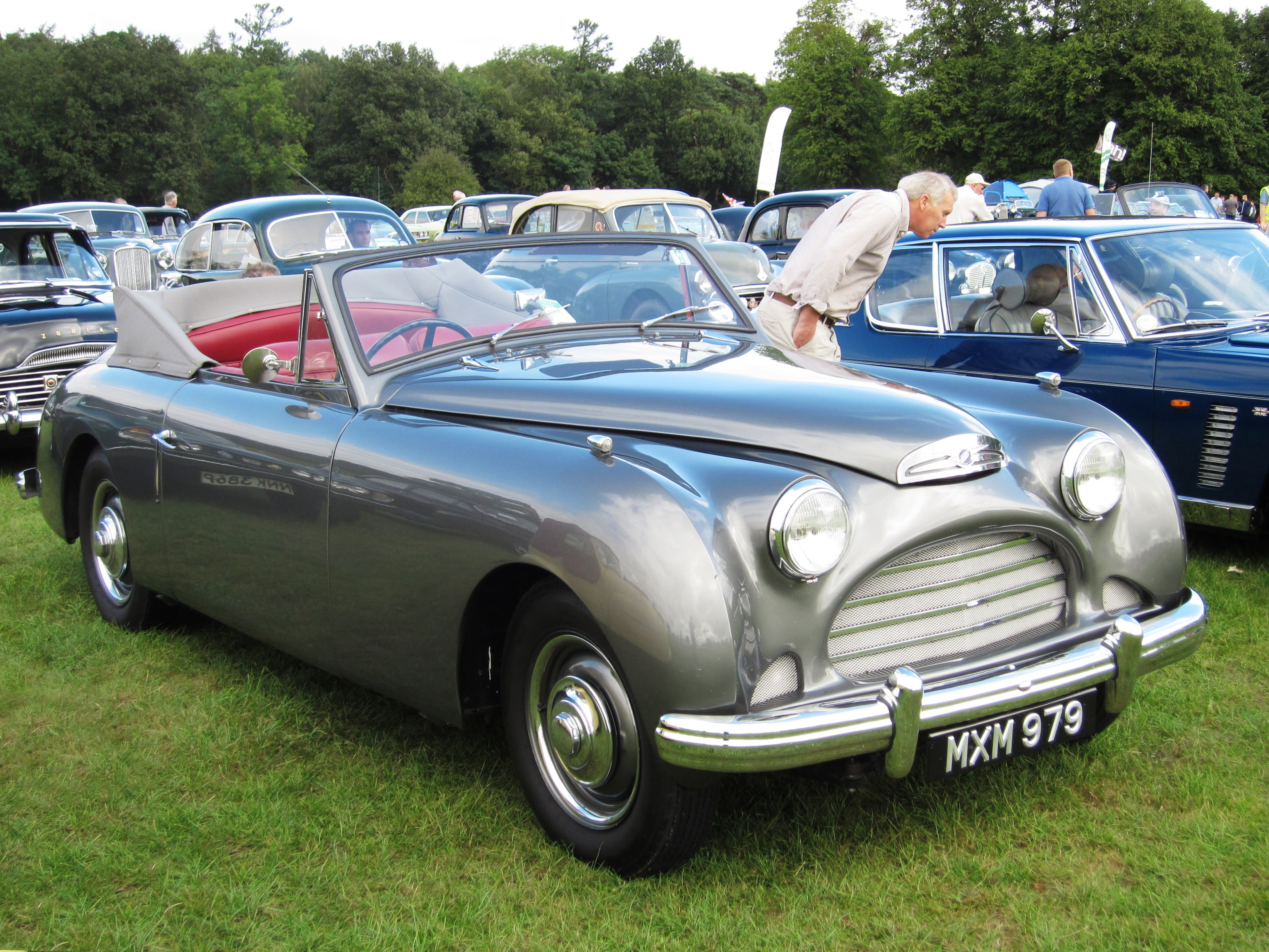 Jensen Interceptor cabriolet 1952